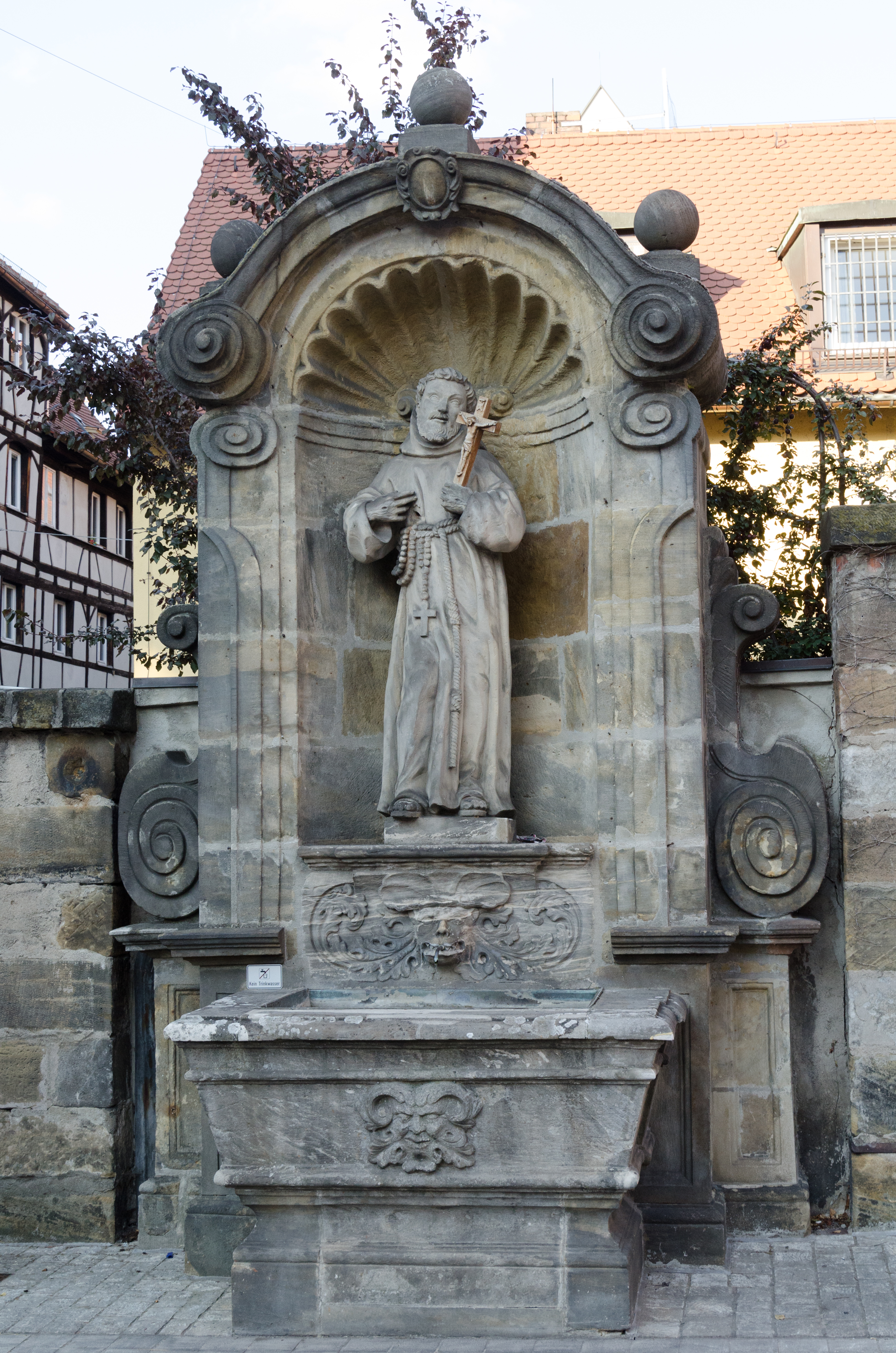 Bamberg, Obere Sandstraße, Franziskusbrunnen